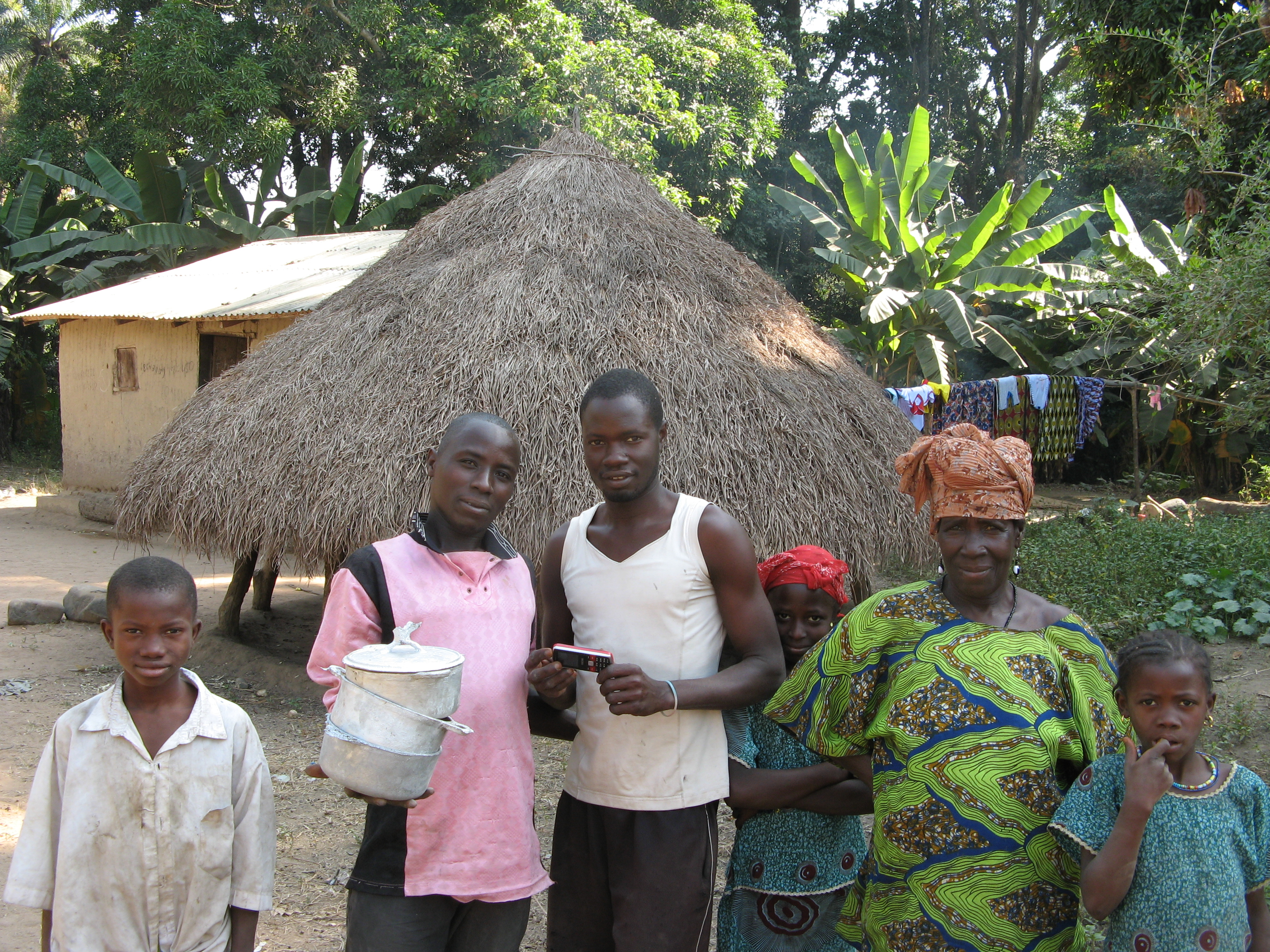 Une famille d'un village sur les contreforts du Fouta Dialon (Guinée Conakry) This is an image of Cultural Fashion or Adornment from Guinea